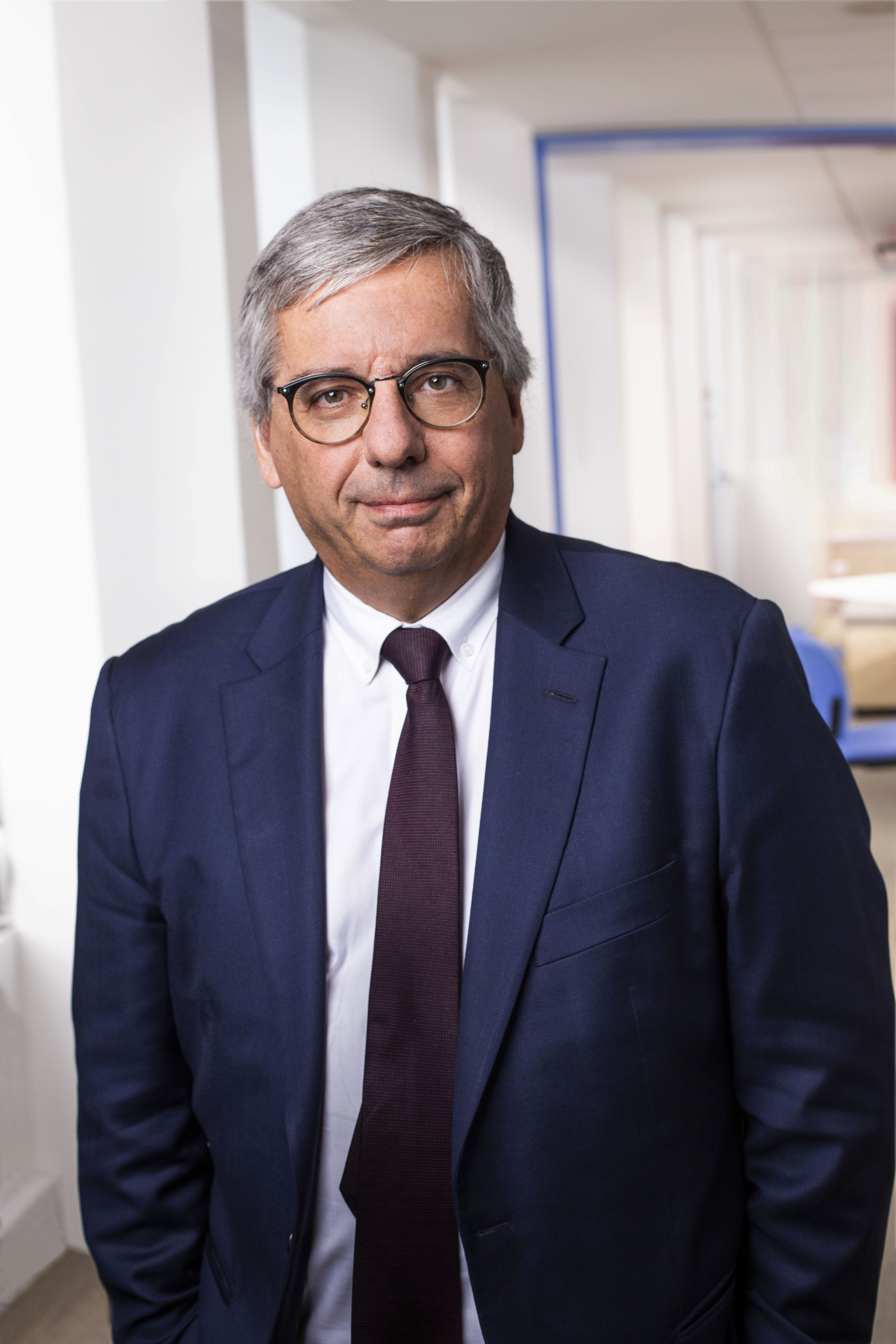 Pascal Imbert - Wavestone offices - mars 2019